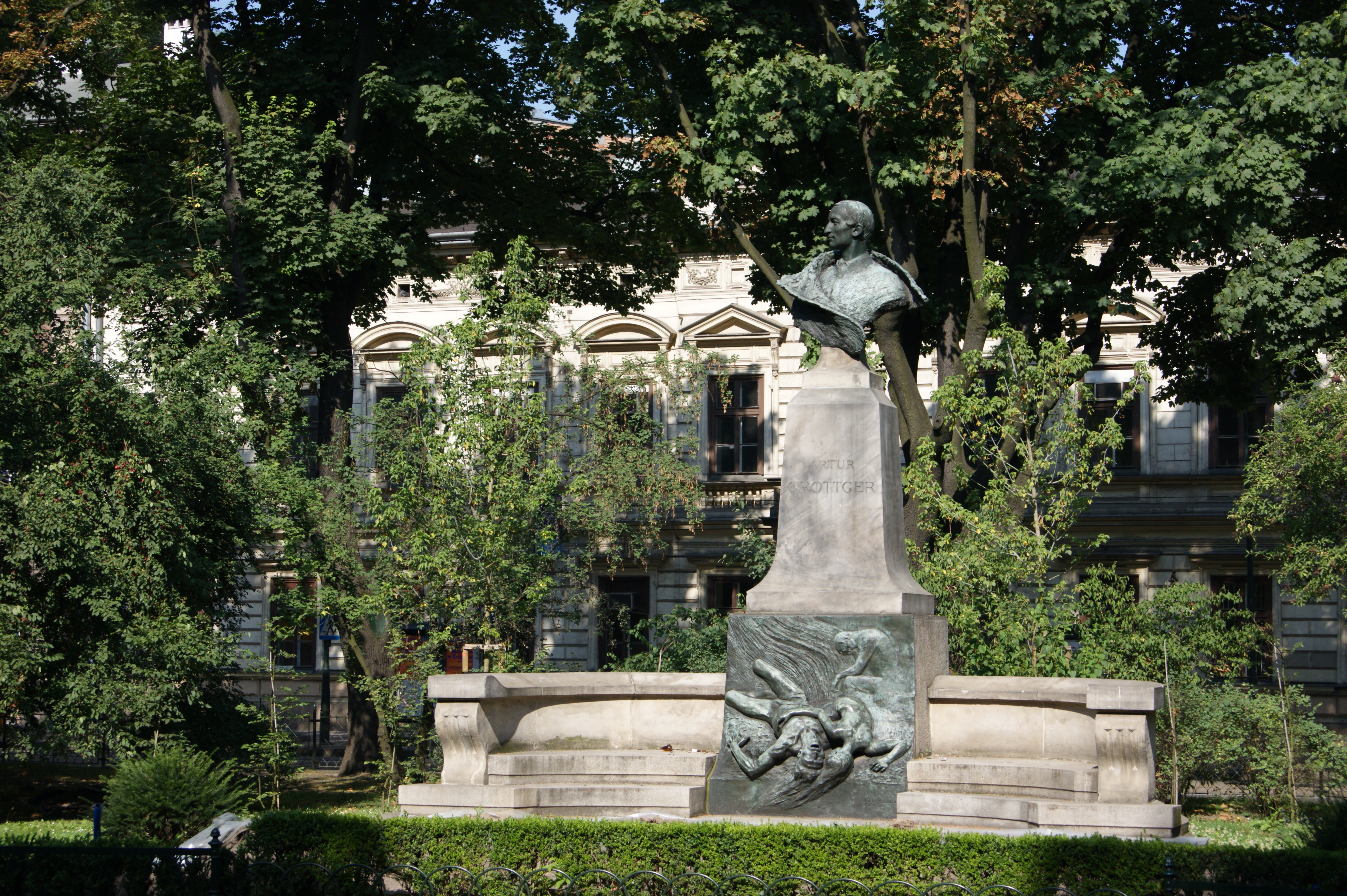 Pomnik Artura Grottgera na krakowskich Plantach autorstwa Wacława Szymanowskiego. Przy ulicy Dunajewskiego